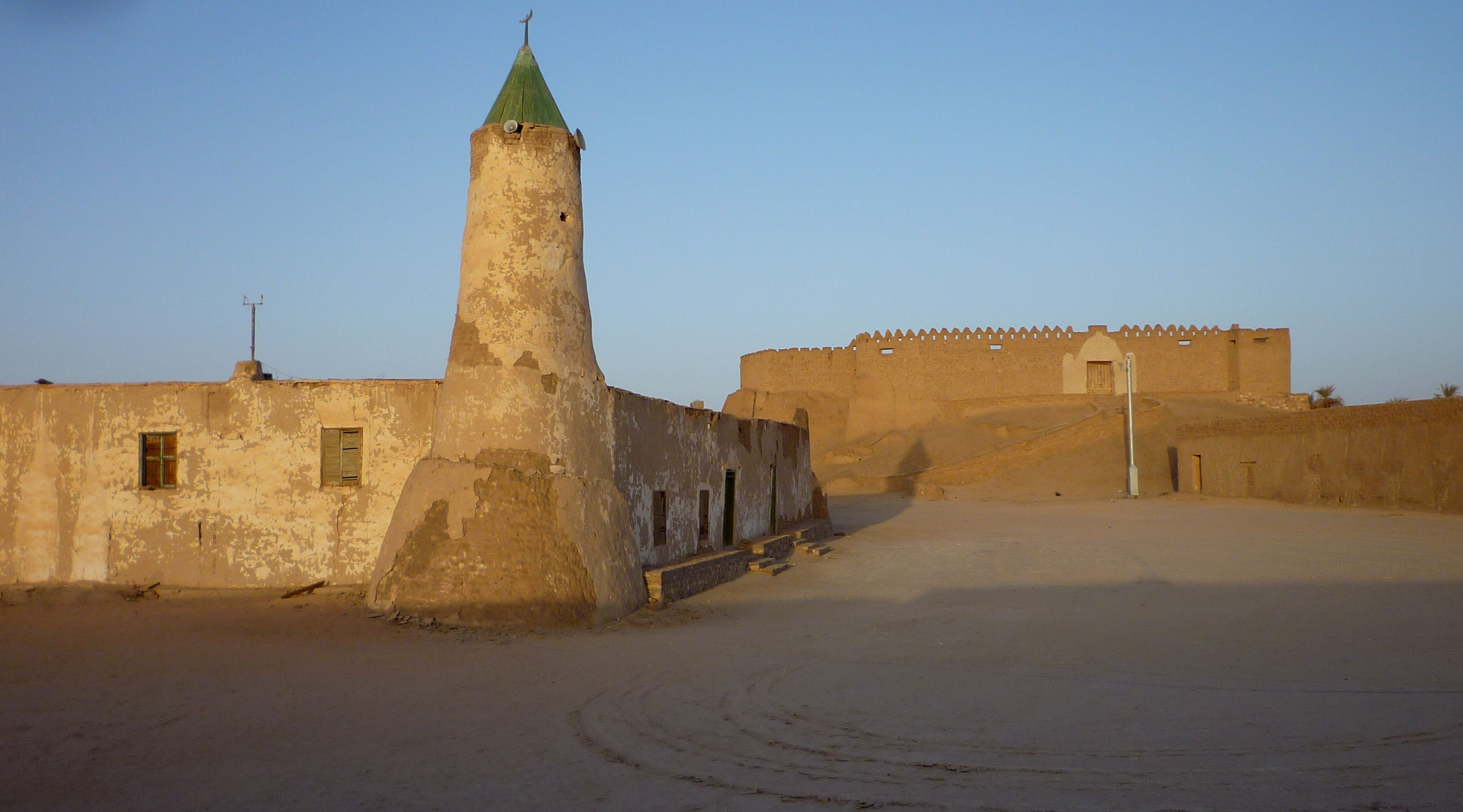 Murzuq-Festung Qala at Turk,Moschee